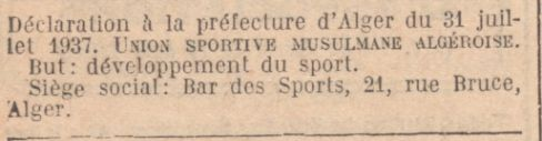 Union sportive musulmane algéroise dans le Journal officiel de la République française